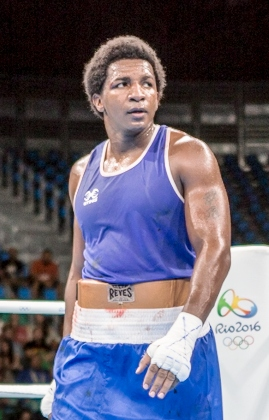 Day 3. Boxer from Ecuador Julio Castillo